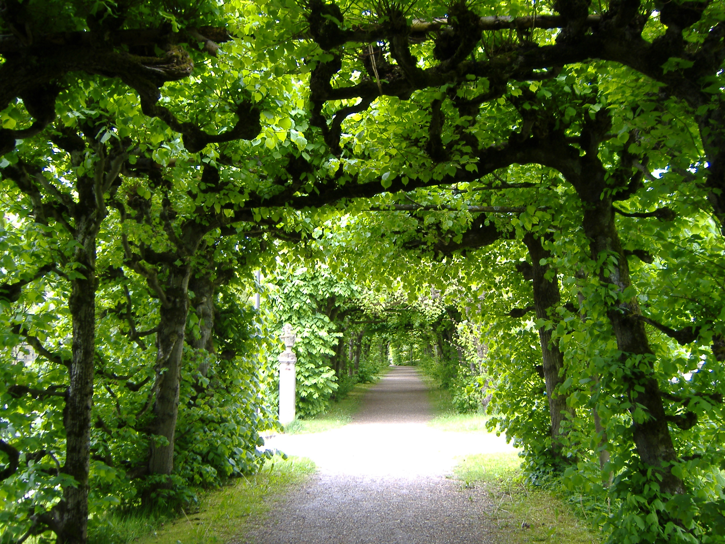 Staatsbad Bad Brückenau